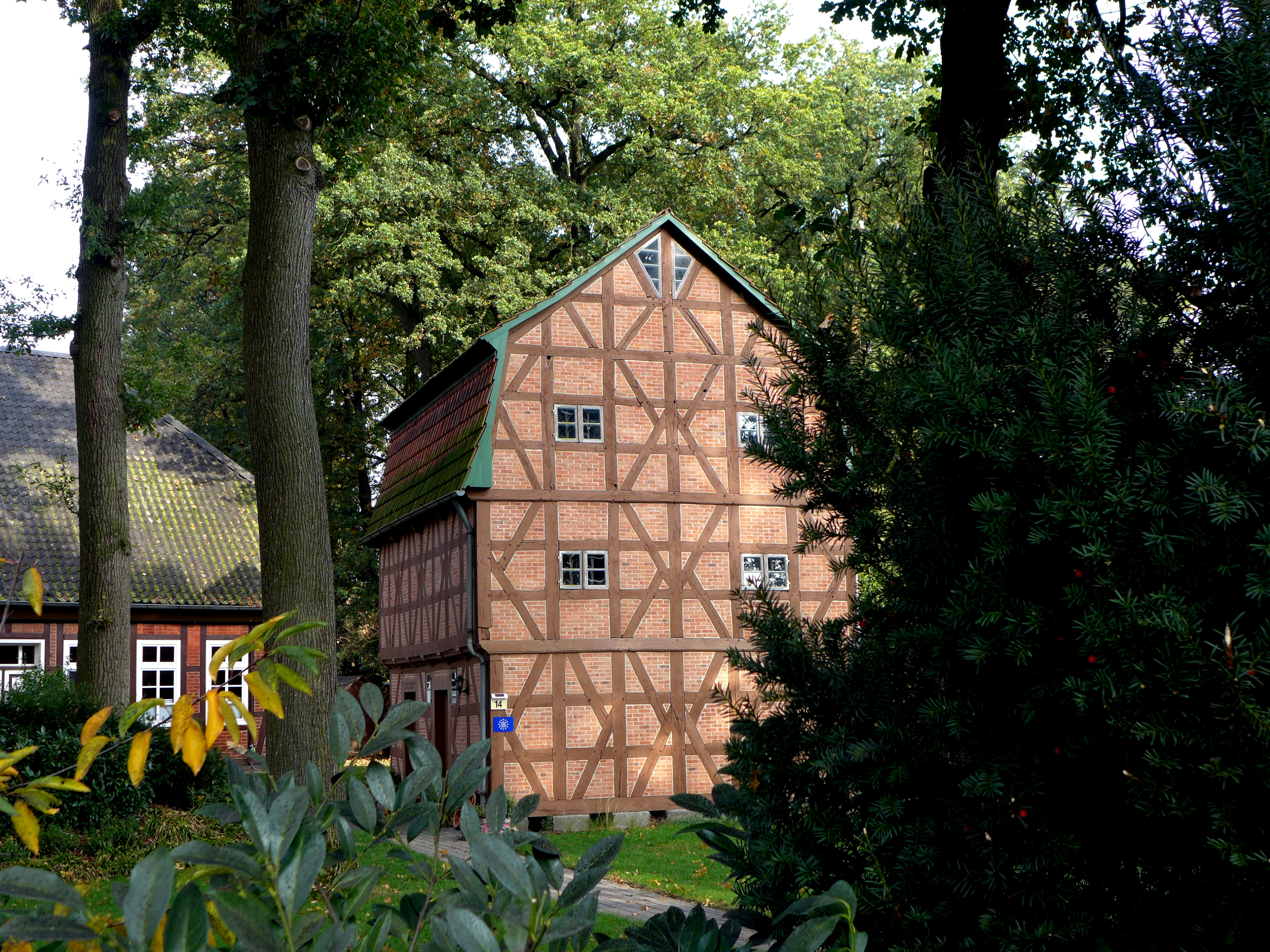 Bemerkenswerter alter Speicher in Tewel bei Neuenkirchen. Aufnahmedatum 2016-10.